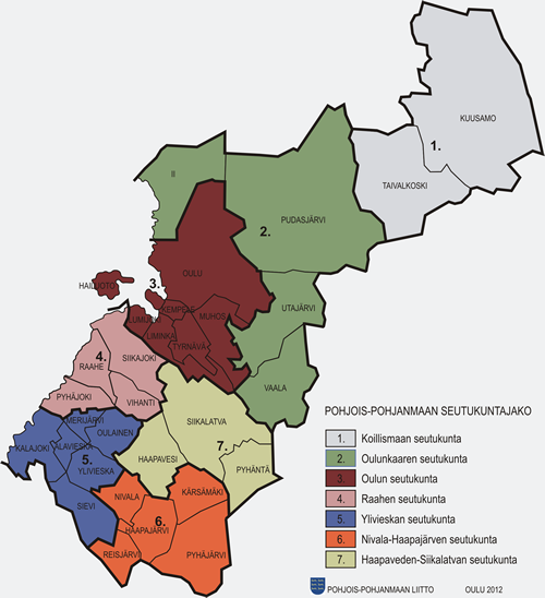 Pohjois-Pohjanmaan liiton jäsenkunnat 1.1.2016 alkaen, jolloin Vaala Kainuun maakunnasta Pohjois-Pohjanmaan maakuntaan.